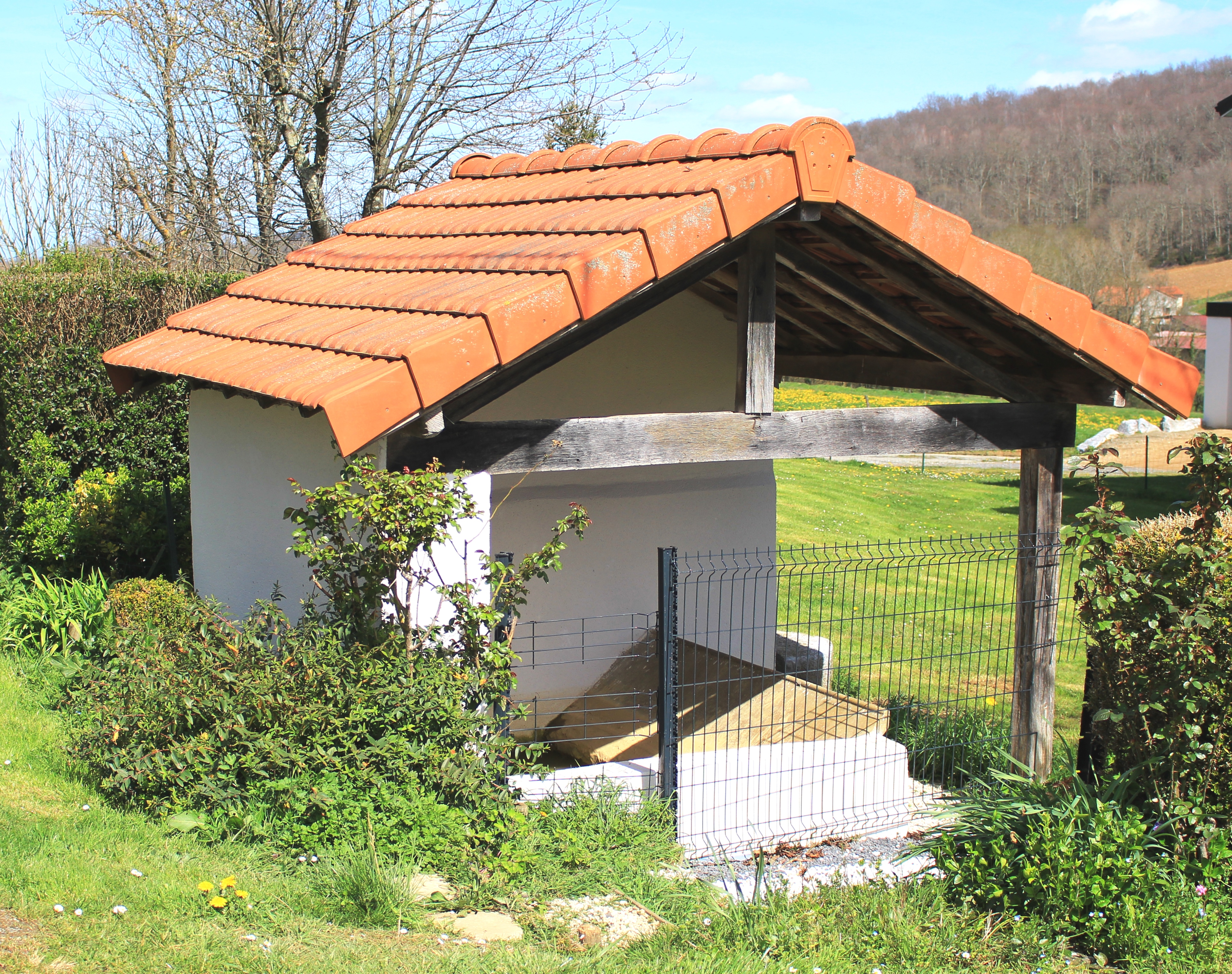 Lavoir de Galez (Hautes-Pyrénées)